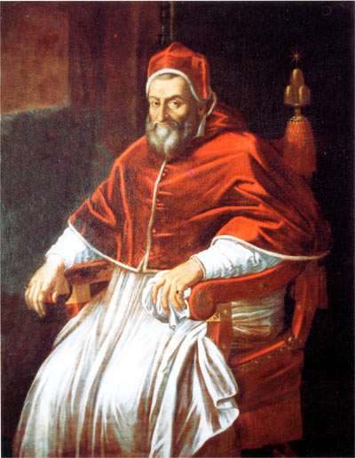 Pope Sixtus V